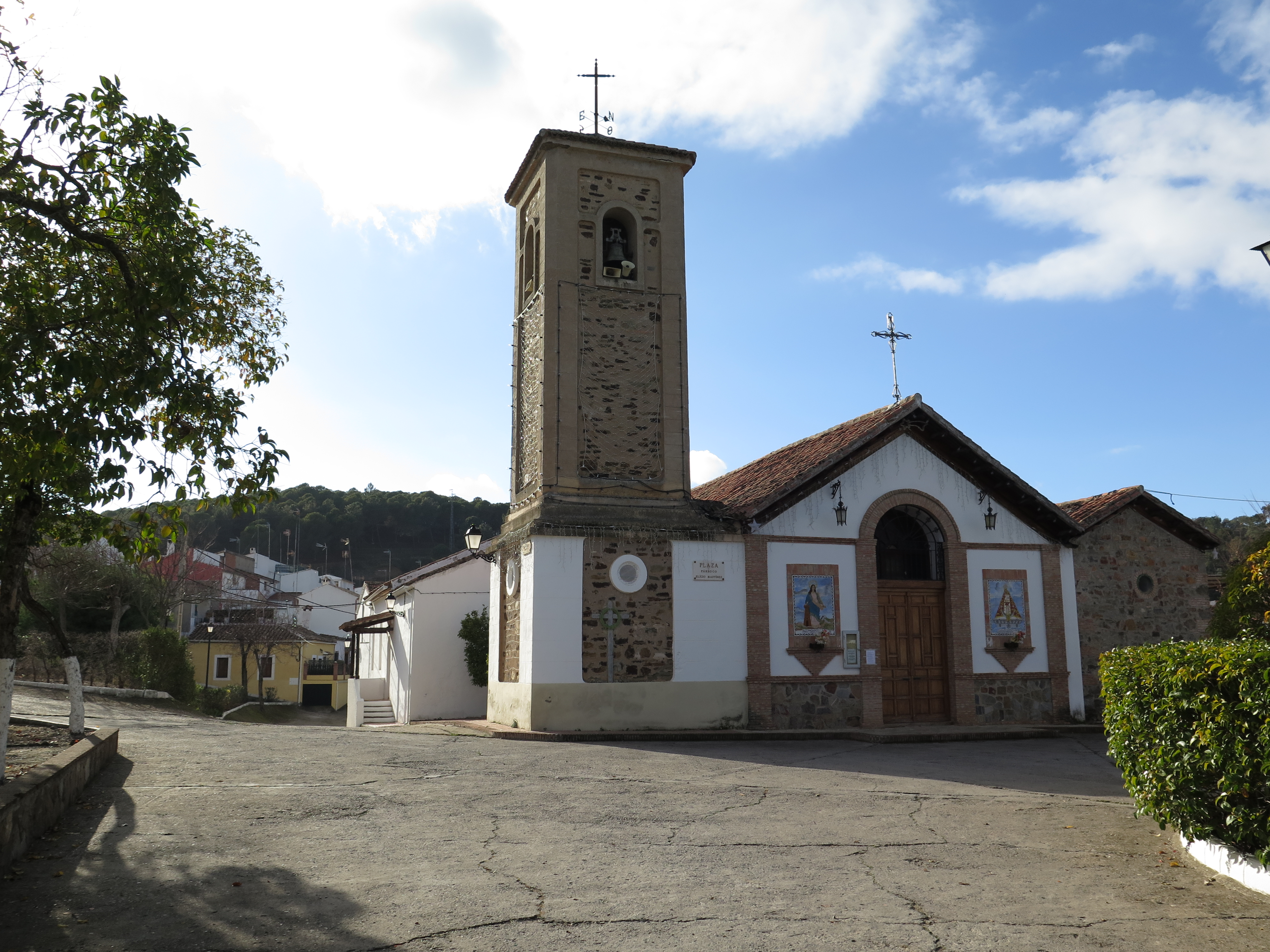 Iglesia de El Centenillo.